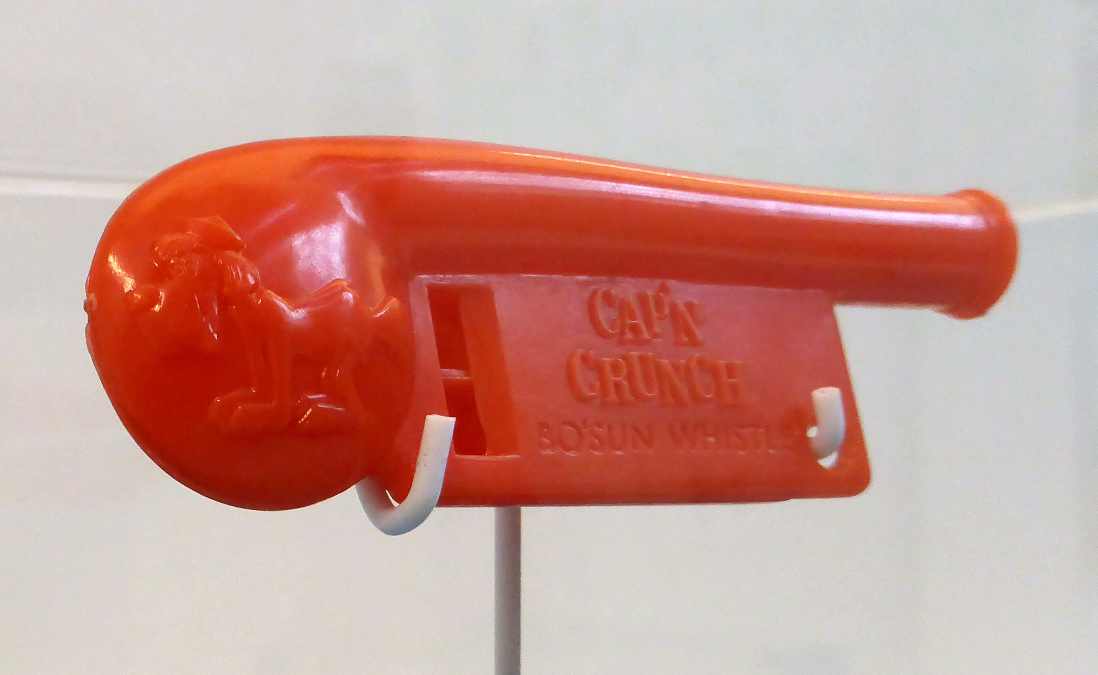 Cap'n Crunch Frühstücksflocken Werbebeilage Spielzeugpfeife mit 2600 Hertz im Deutschen Technikmuseum in Berlin. Wikipedianische KulTour am 10. Oktober 2015 in der Ausstellung des Museums.